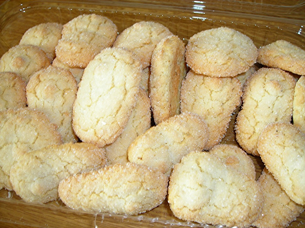 "fave dei morti", typical italian biscuits, Perugia, Umbria, Italy